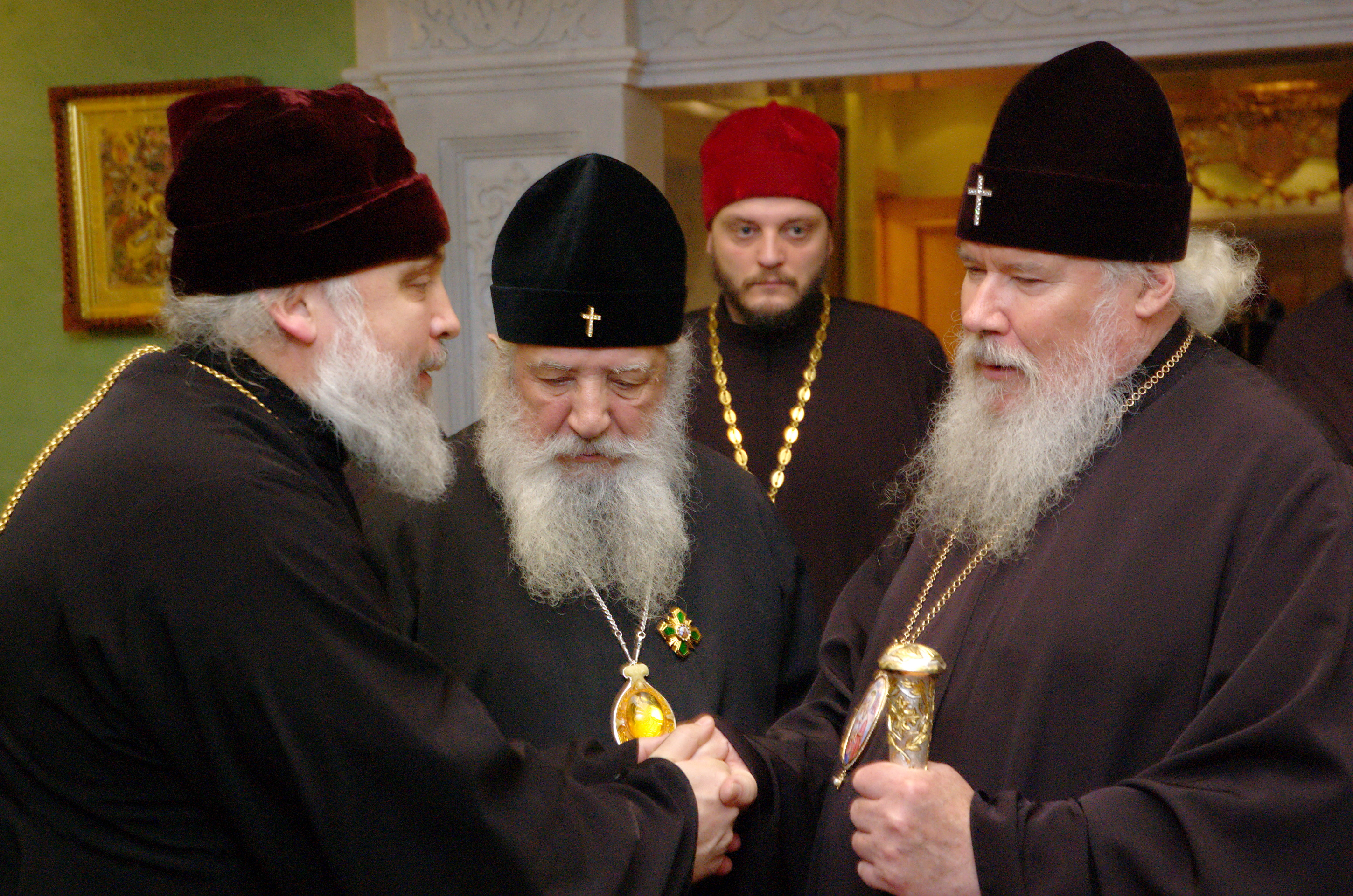 Забудем старые обиды